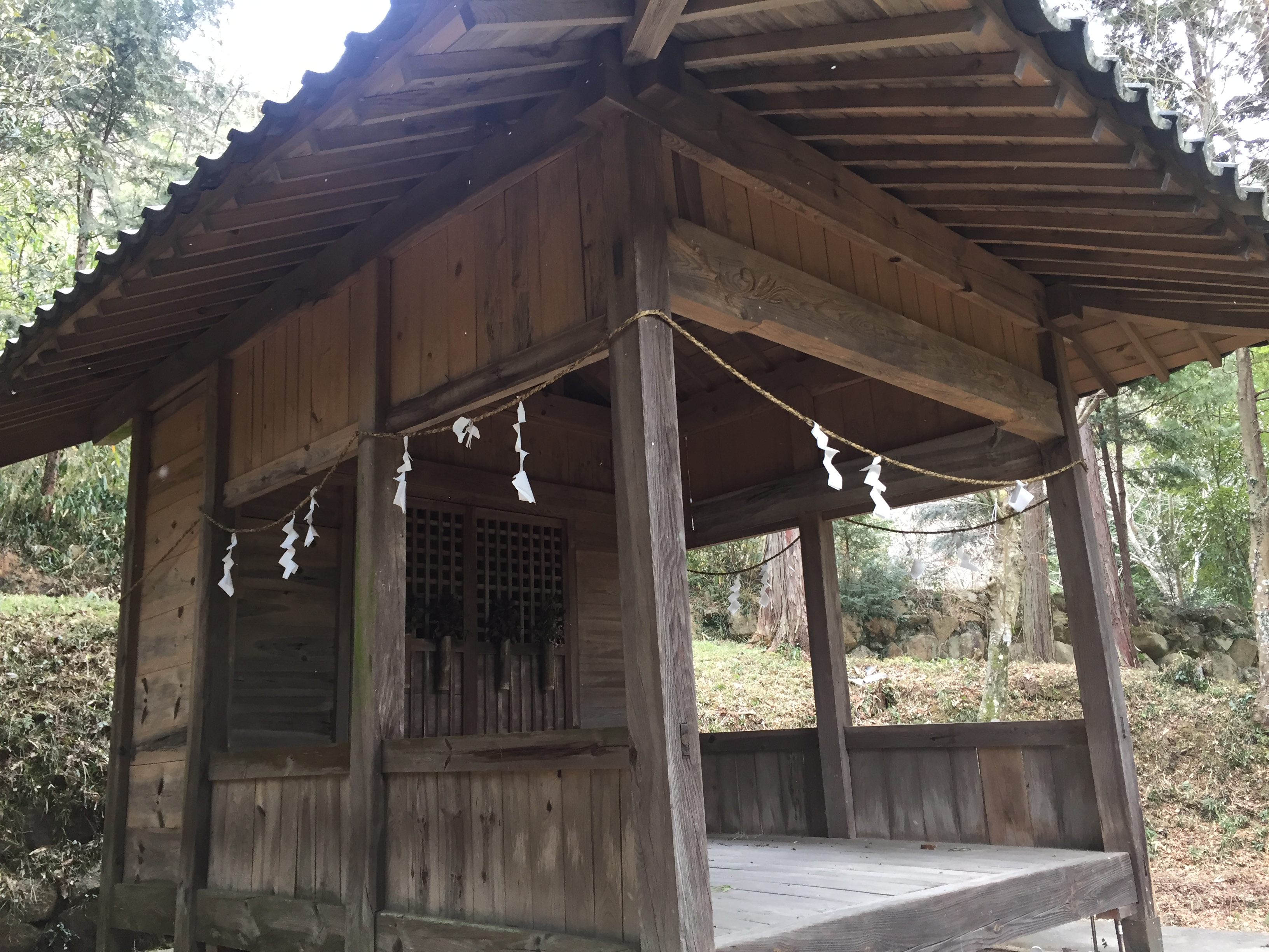 大滝八幡神社